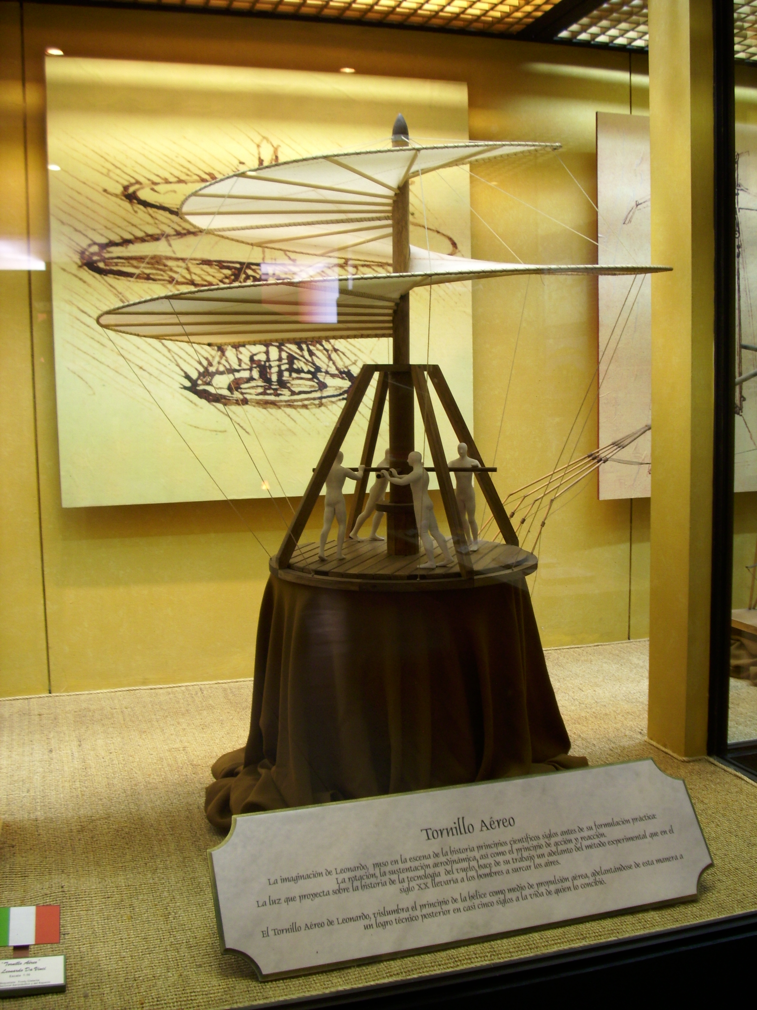 Una maqueta a escala 1:10 del «Tornillo Aéreo», uno de los inventos de Leonardo da Vinci para que el ser humano pudiera volar. Museo Nacional Aeronáutico y del Espacio. Cerrillos, Santiago de Chile.